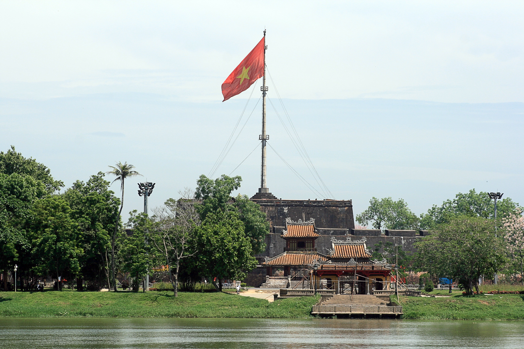 PhuVan Pavilion, Hue, Viet Nam (từ dưới lên: Nghênh Lương Đình - Phu Văn Lâu - Kỳ Đài)